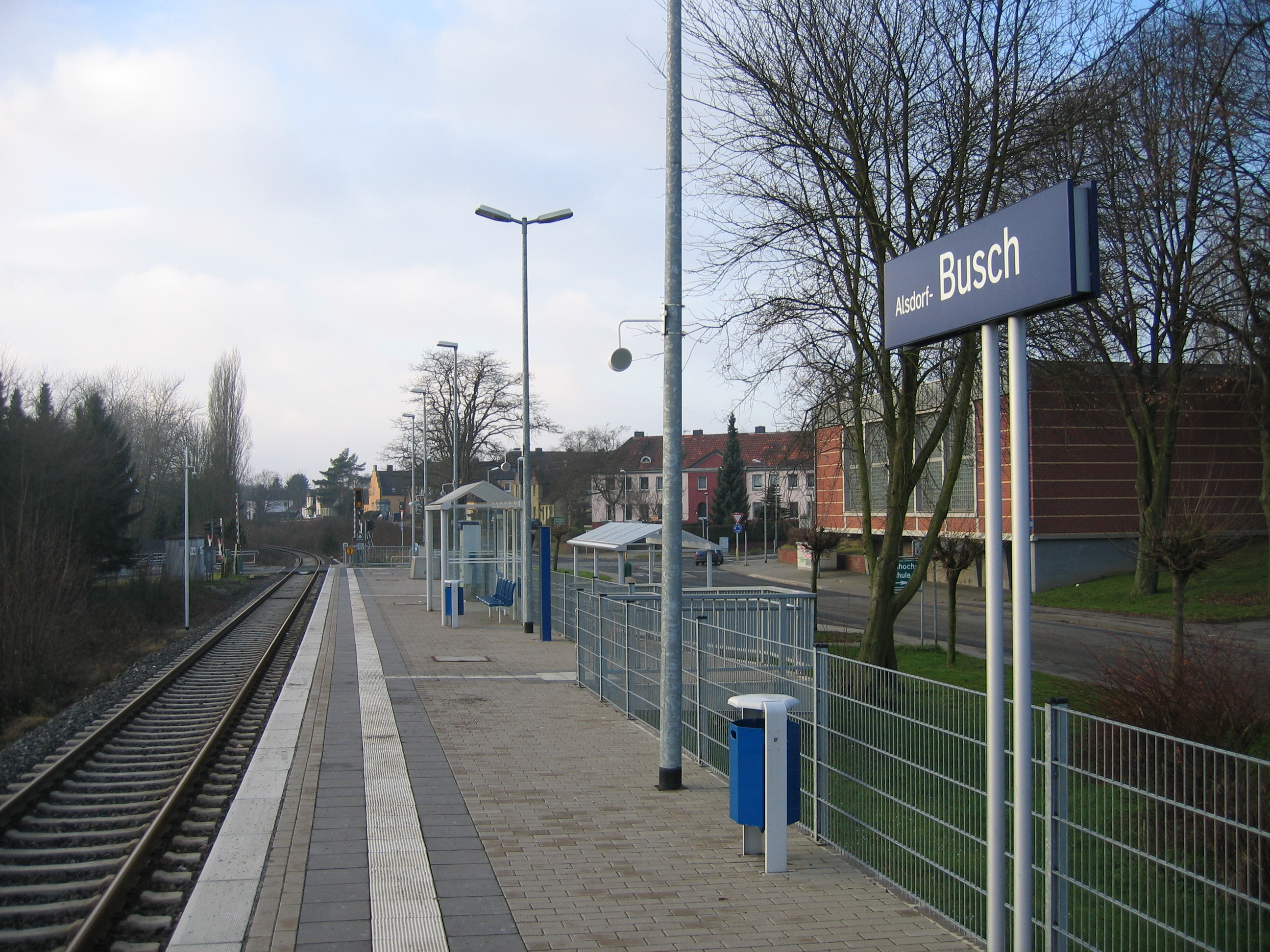 Haltepunkt Alsdorf-Busch der Bahnstrecke Stolberg–Herzogenrath